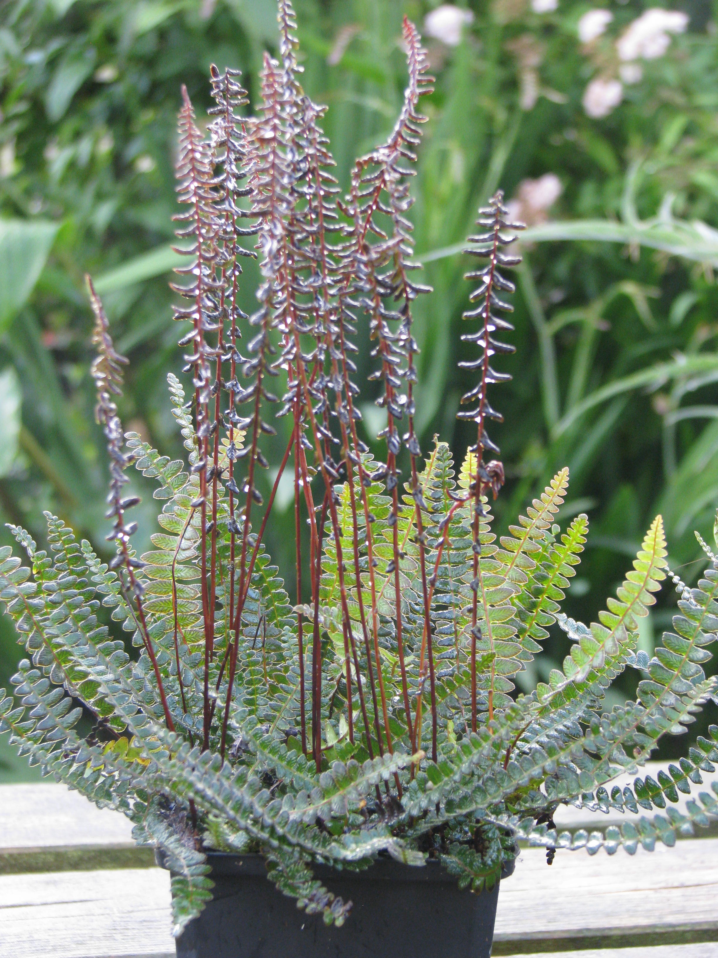 Blechnum penna-marina alpina